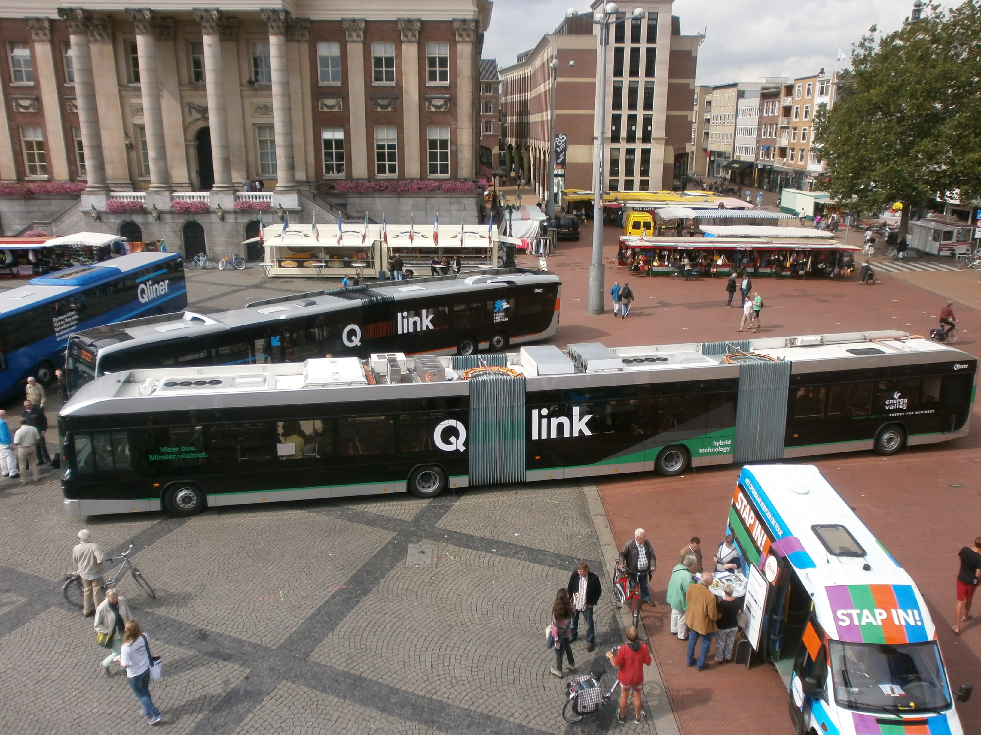 De dubbelgelede bus tijdens de presentatie op de Grote Markt in Groningen